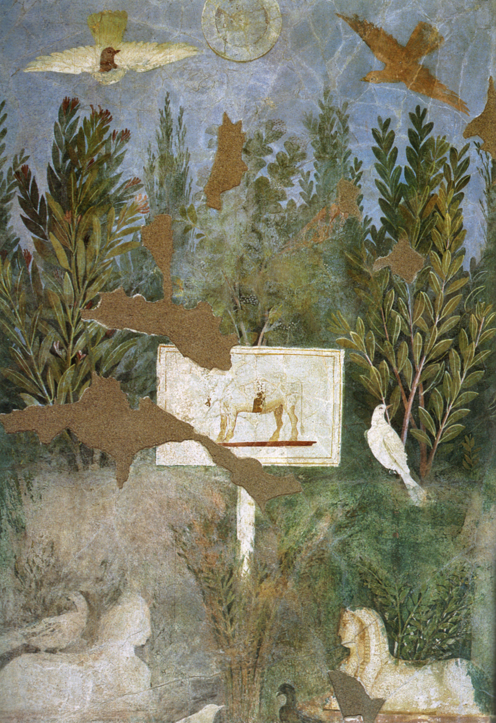 Casa del bracciale d'oro, pompei, particolare di una parete